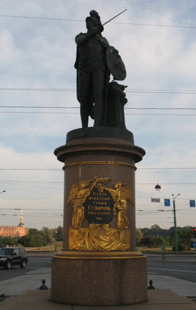 Monument to Suvorov in Saint-Petersburg.